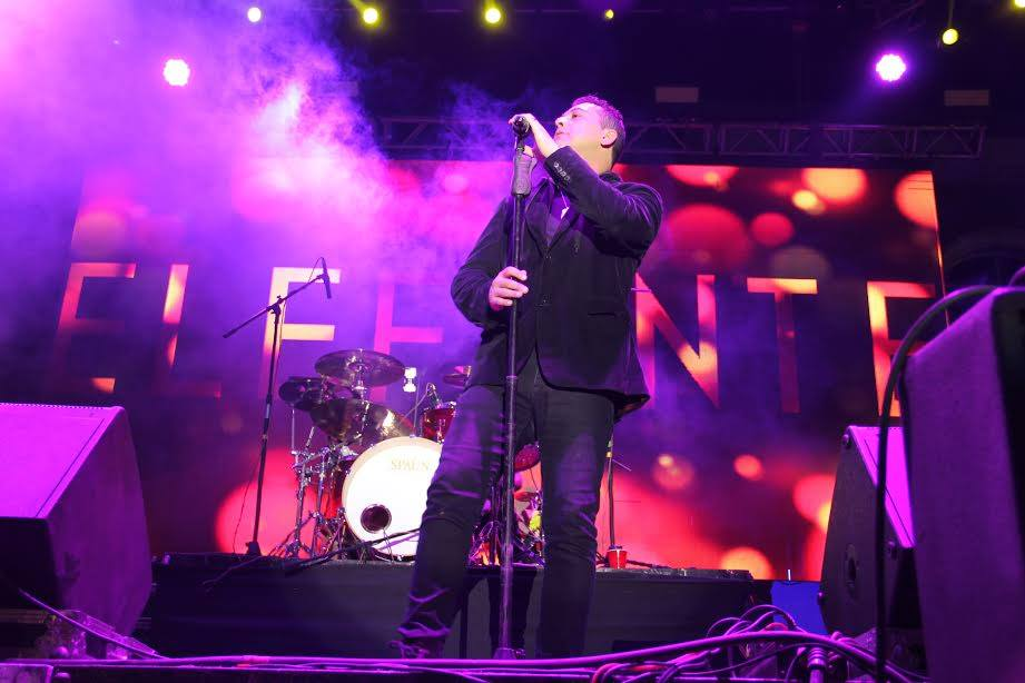 Elefante en la feria de Zacatelco 2017